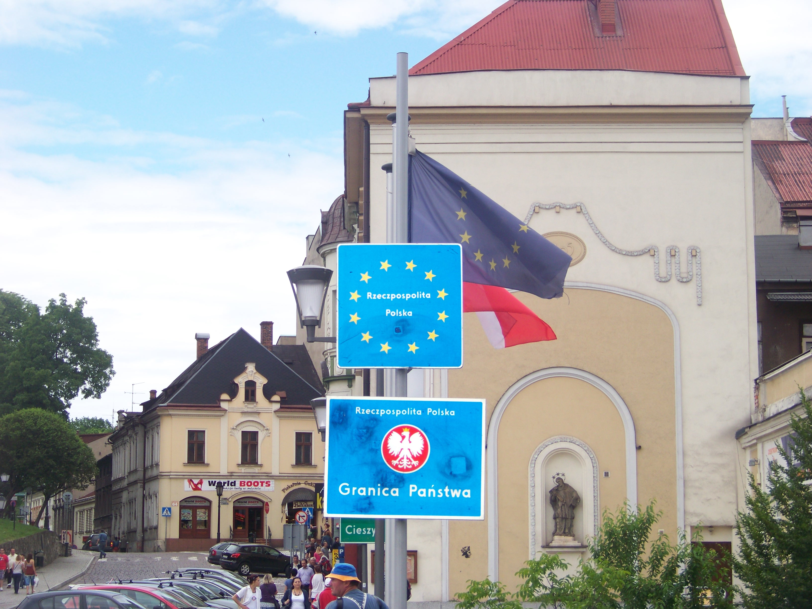 Przejście graniczne pomiędzy polską miejscowością Cieszyn oraz czeską miejscowością Český Těšín.